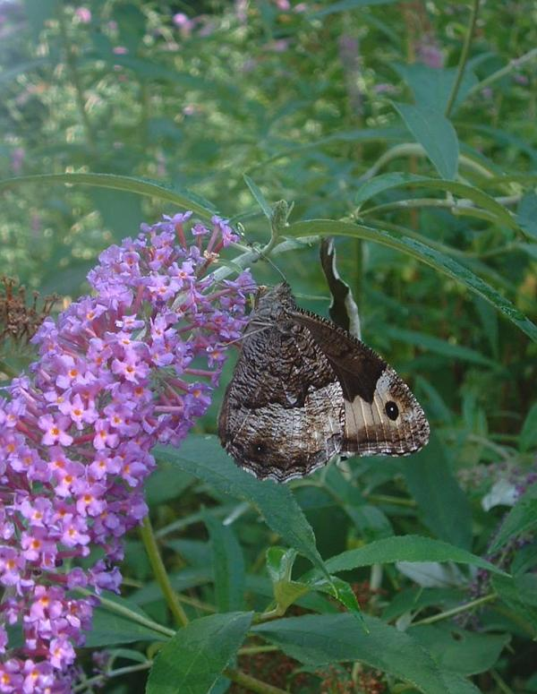 Sylvandre, Bezins-Garraux